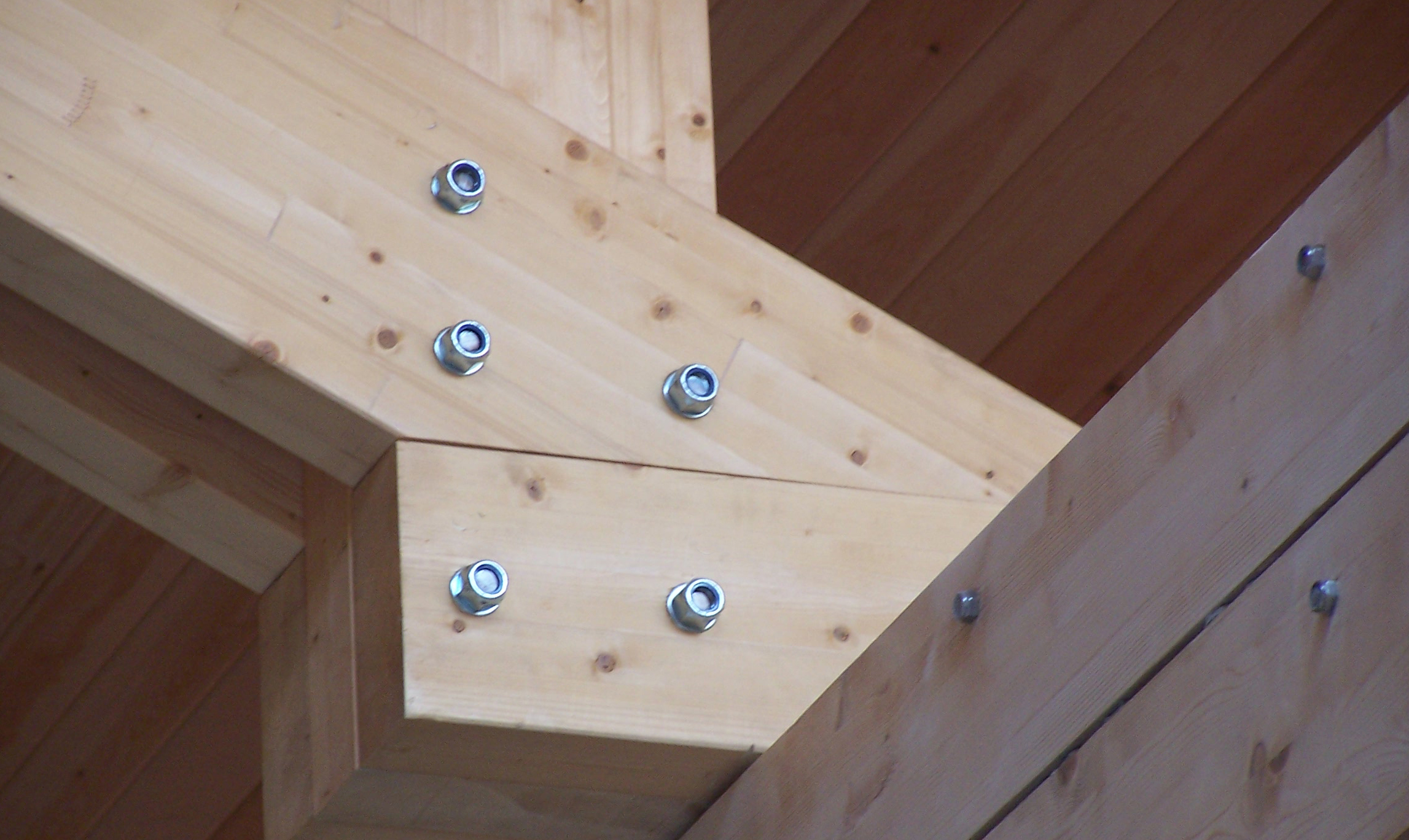 Lamine ahsap-bakirkoy-ido iskele makas baglantisi